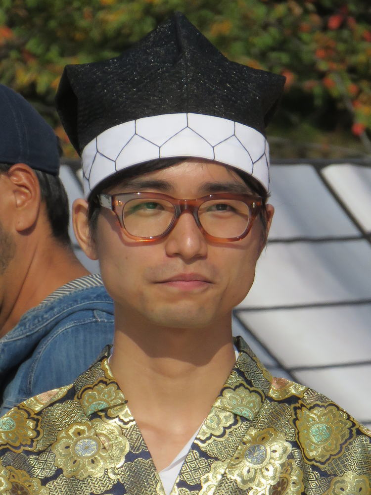 将棋棋士の大橋貴洸（平成３０年１１月、姫路市で行われた人間将棋にて）